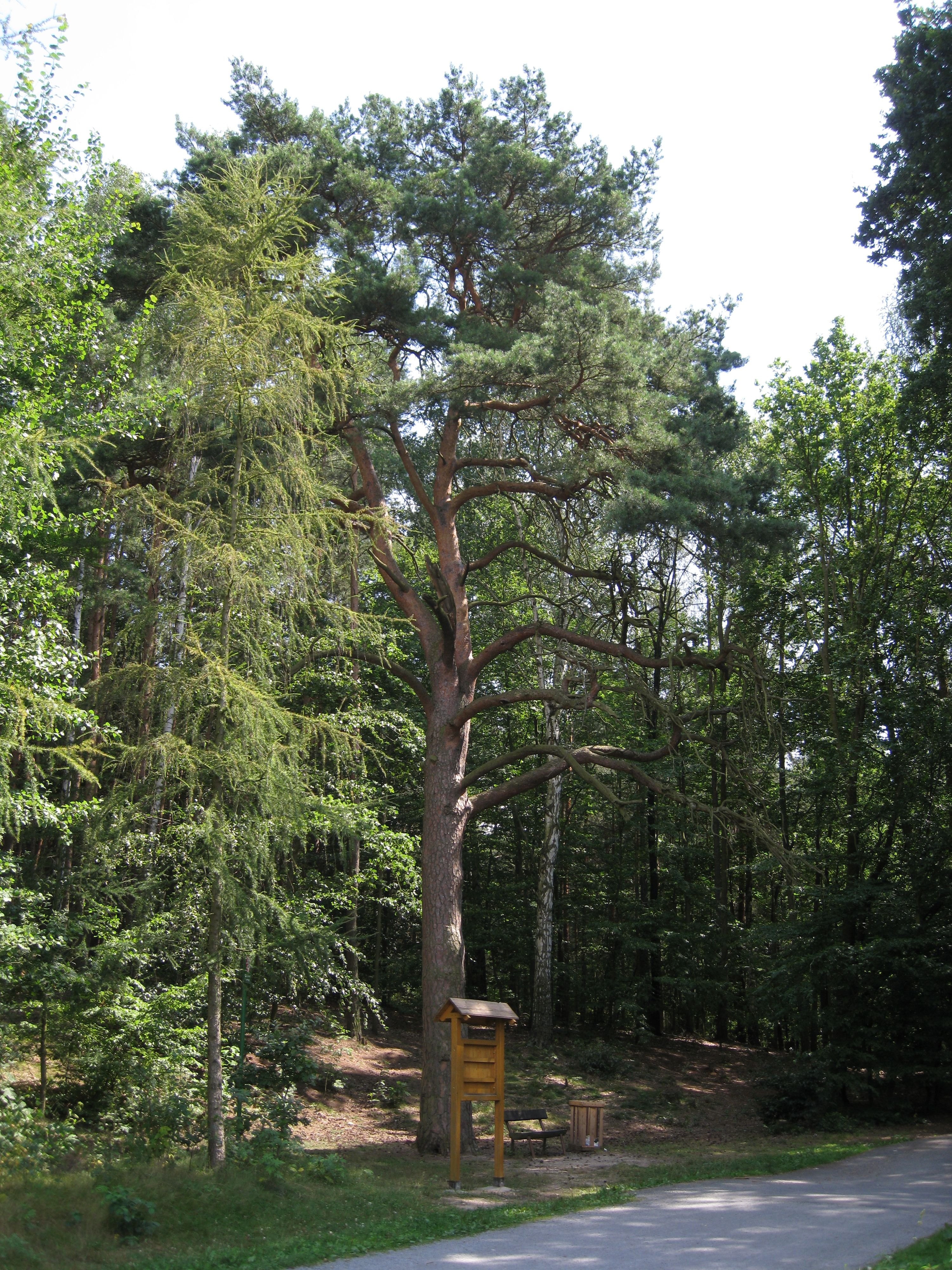 Borovice u rybníka Košinář v Plzni. Státem chráněný strom.